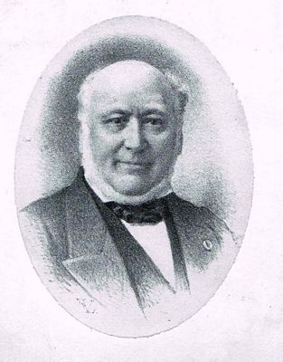 voormalig burgemeester van Wevelgem